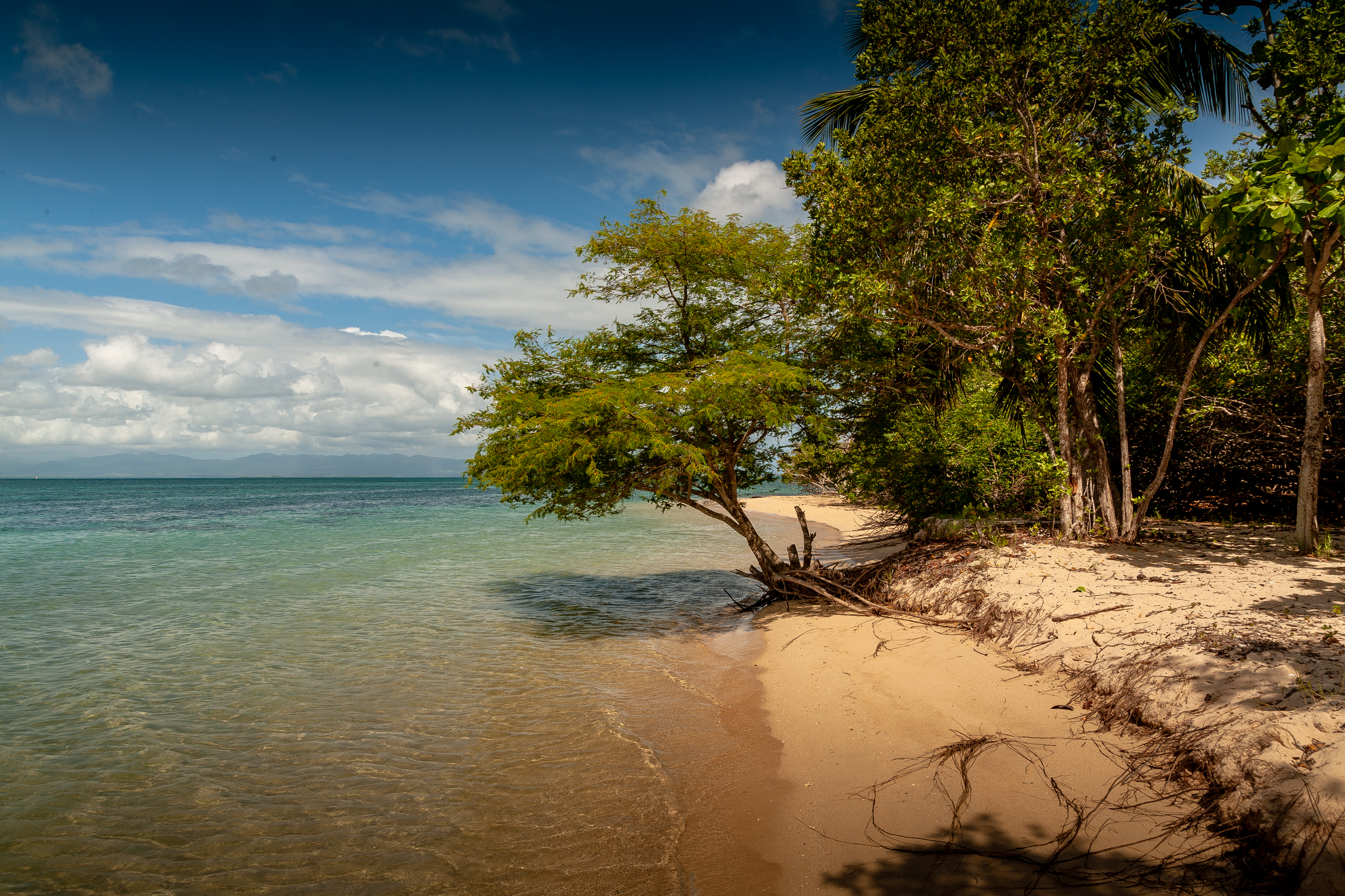 Plage de l'ilet pointe sable entre Morne à l'eau et Petit-canal